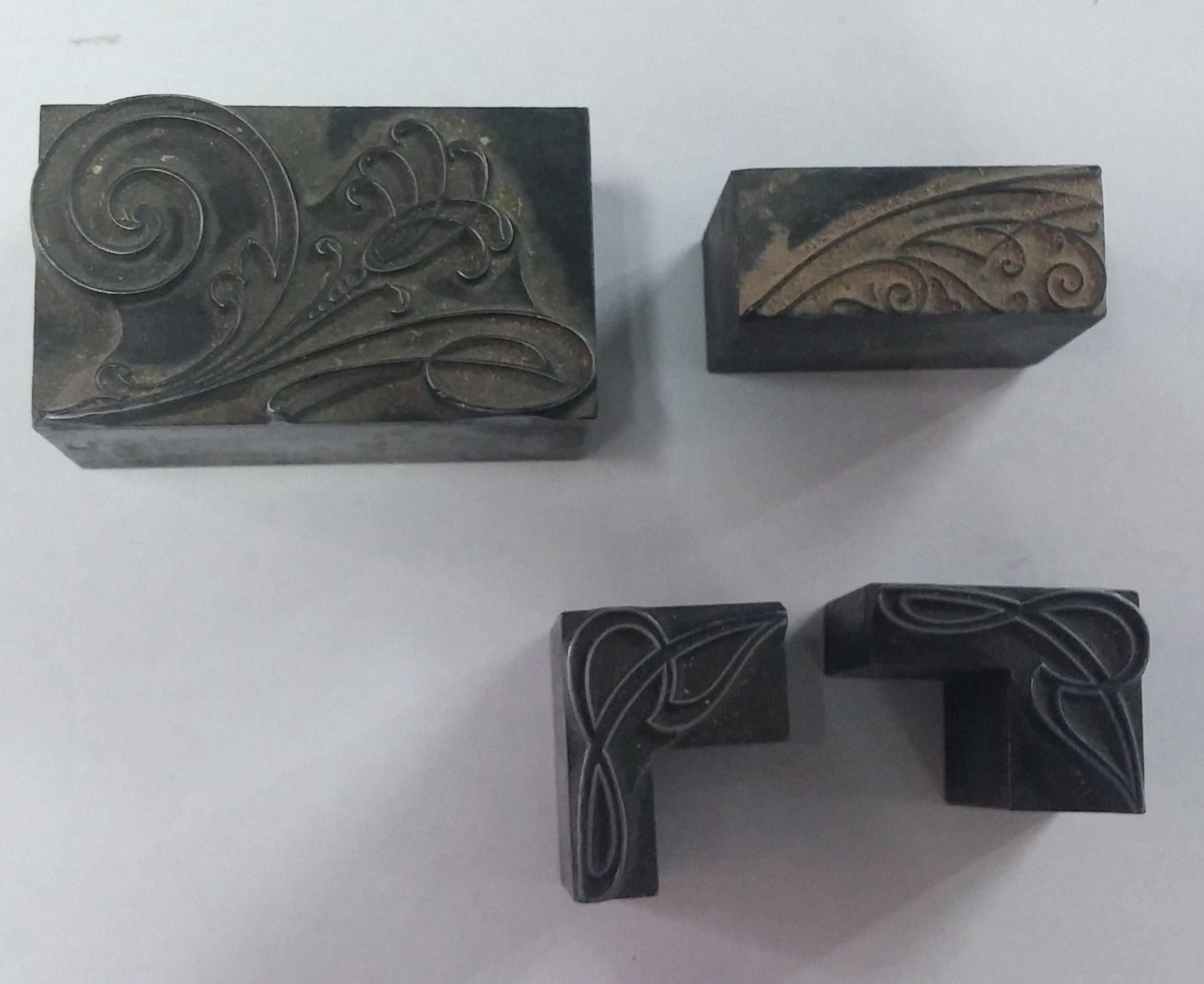 שבלונות מתכת ששמשו לעיטור הפרסומים באדיבות דני פרידמן